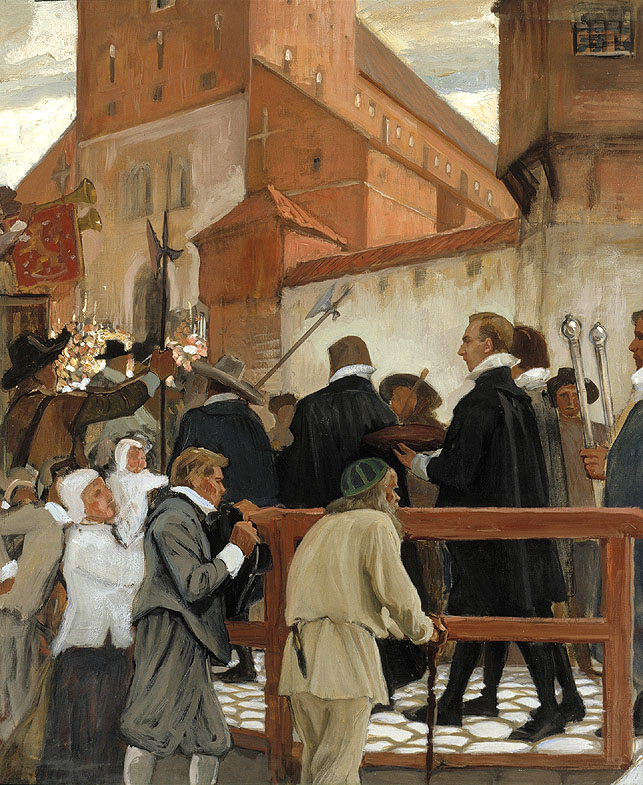 Albert Edelfelts painting Turun akatemian vihkiäiset (part 1/3).